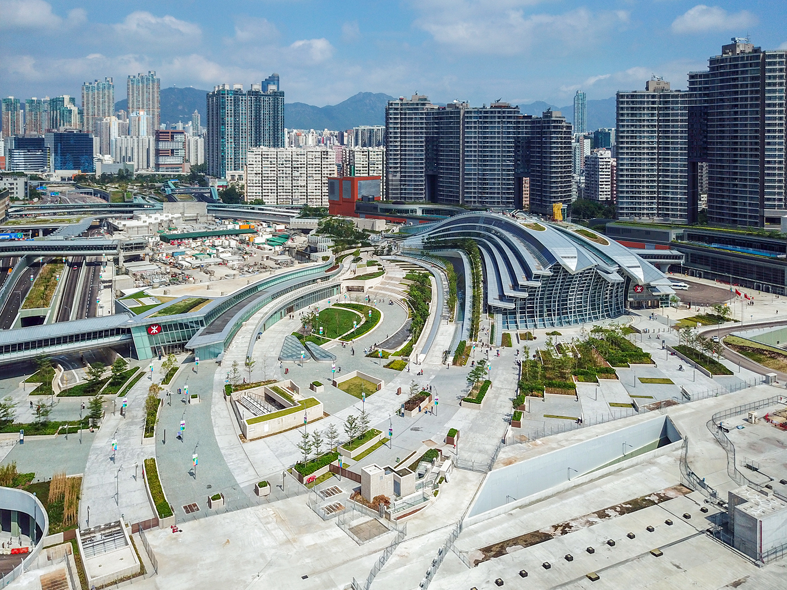 Hong Kong West Kowloon Station